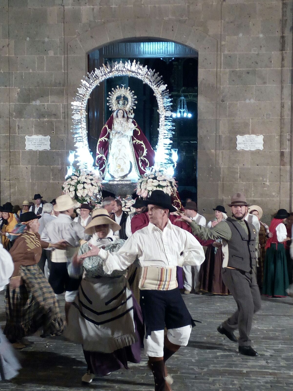 Fiestas de Nuestra Señora del Rosario This is a photography of a Folklore festival in Spain (Wikidata id Q23650279).